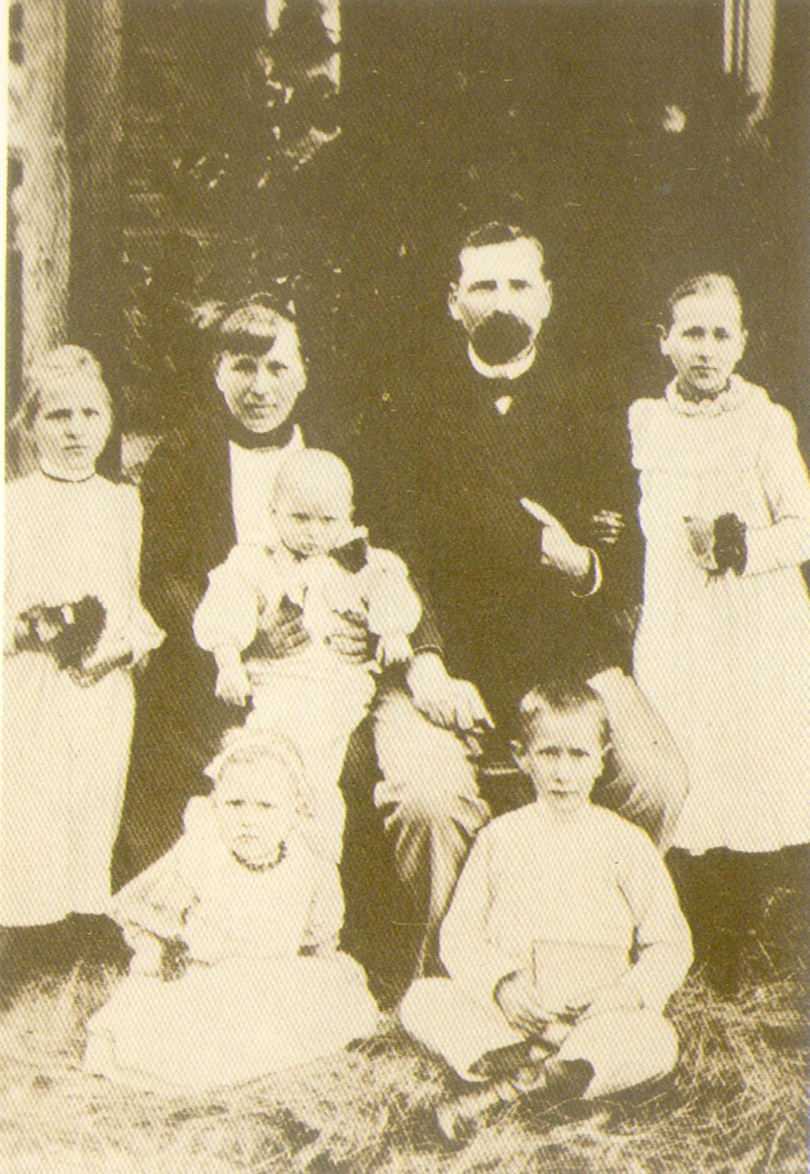 Беларуская (тарашкевіца): Канстанцыя Буйло (крайняя зьлева) разам зь сям'ёй, 1900